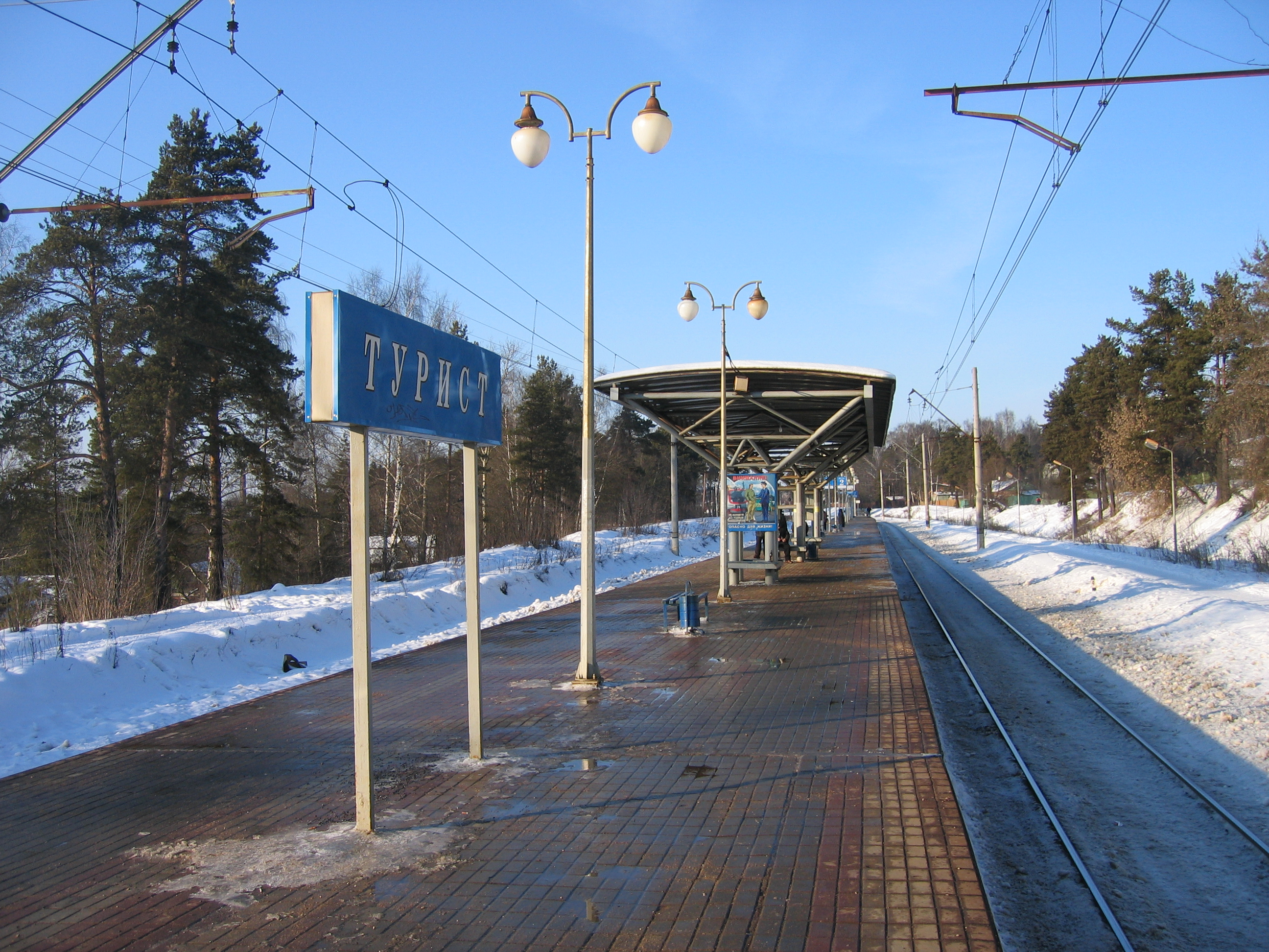 Железнодорожная платформа Турист в пос. Деденево Московской области